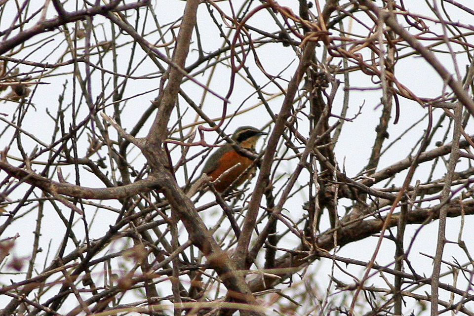 Ledesam to Las Lajites